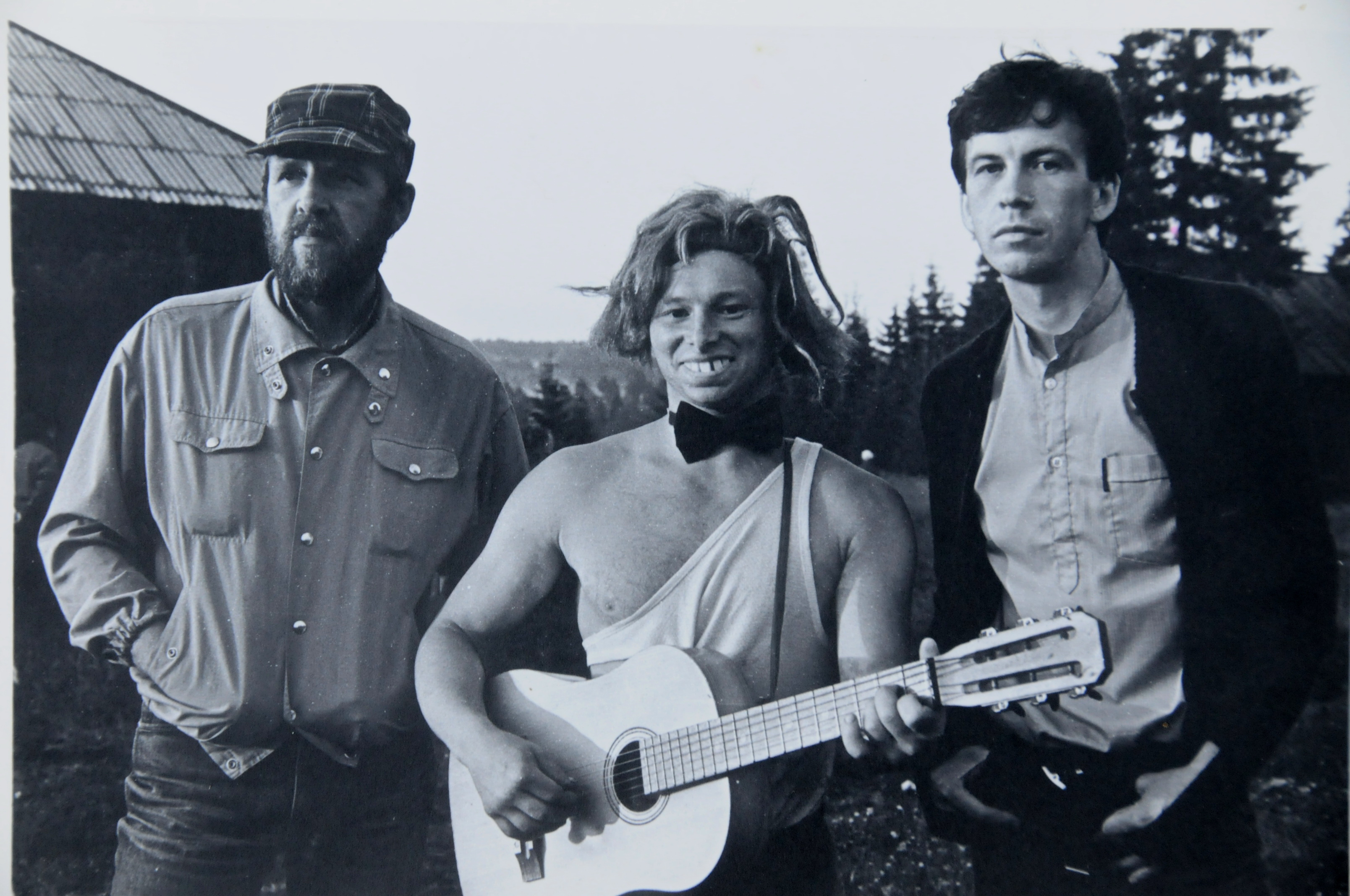 Снимок сделан в 1983 или 1984 году на слёте рабочей молодежи в деревне, куда мы случайно заехали по Каме. Слева — художник Вячеслав Смирнов, справа — Владислав Дрожащих, Человек в центре, наверное, ударник труда.